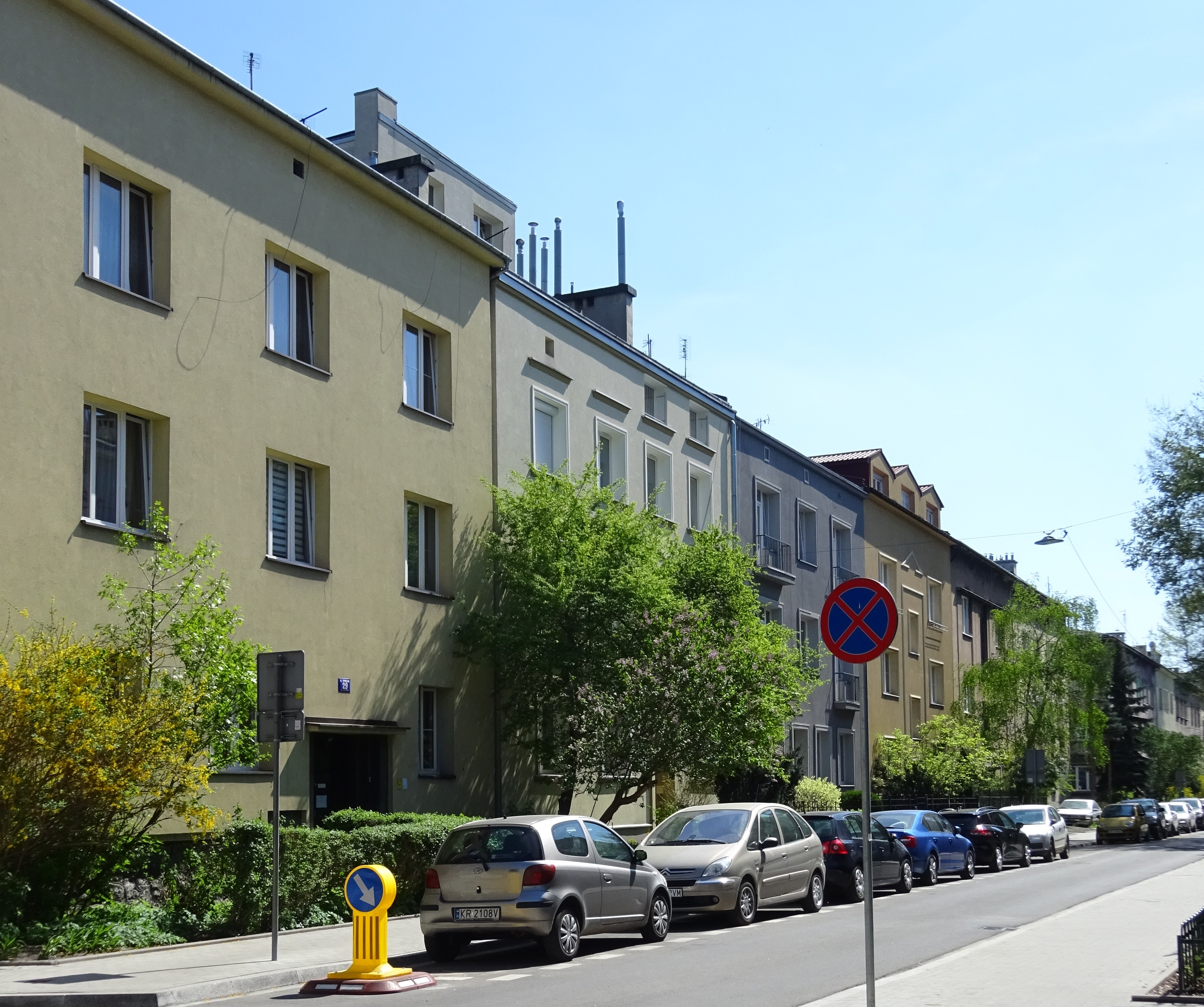 Nowa Wieś Narodowa - typowa międzywojenna zabudowa, ulica Spokojna. Kraków, 2018.